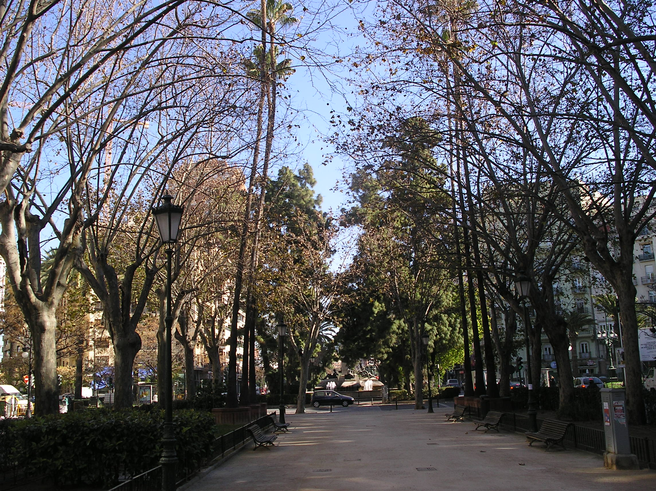 Vista de la Gran Vía Marqués del Turia, de la localidad de Valencia, España.